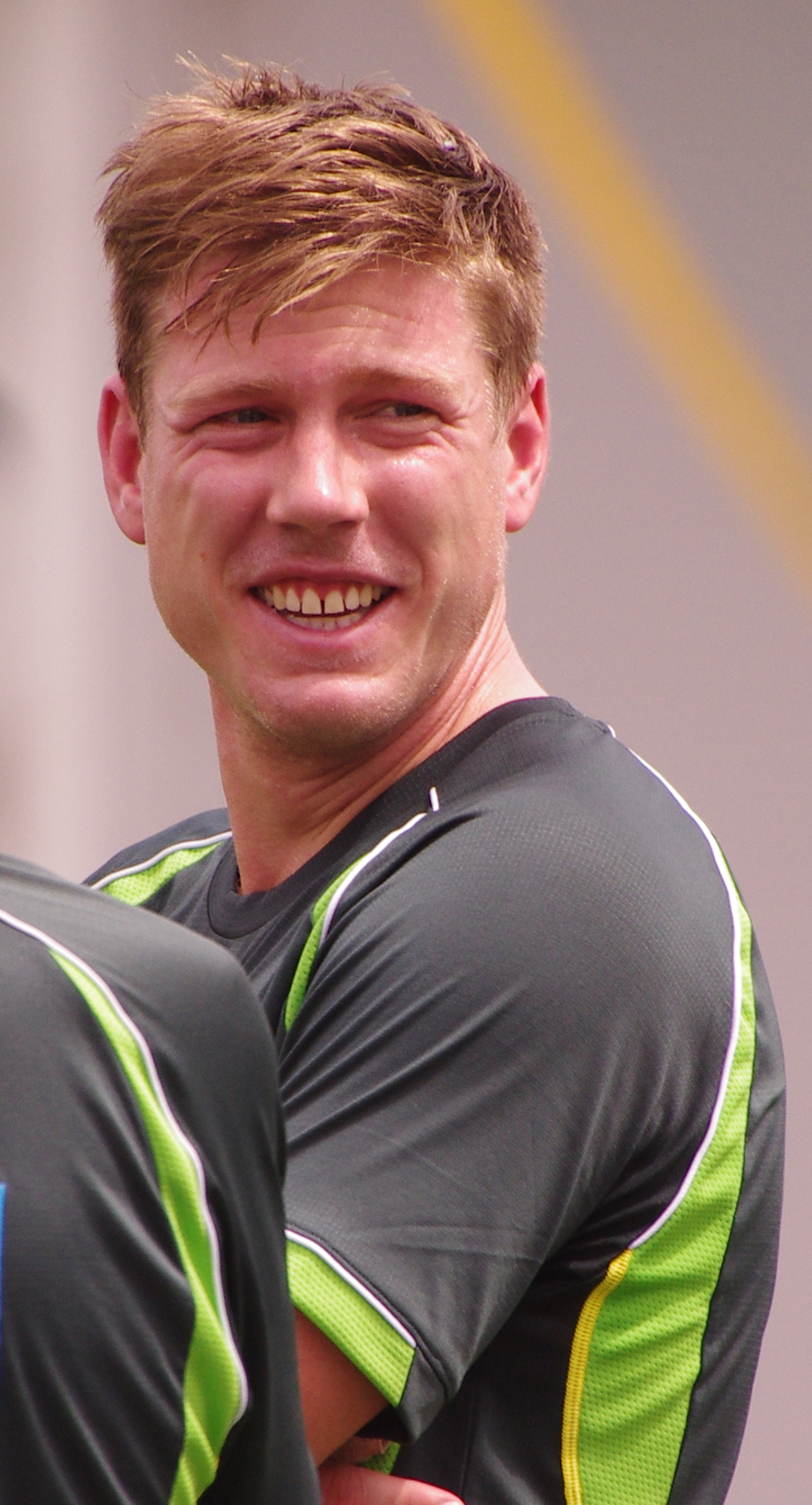 JAMES FAULKNER